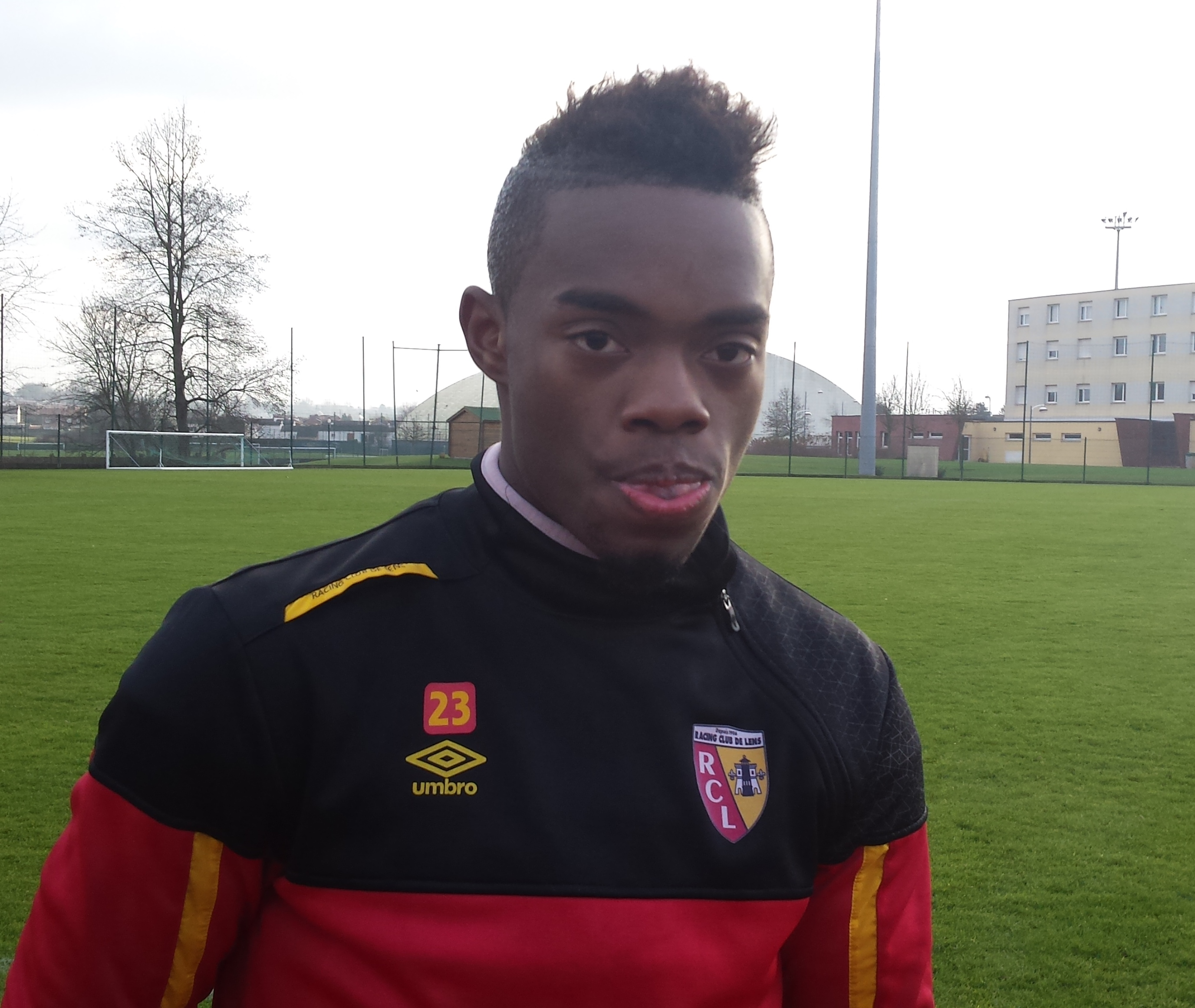 Wylan Cyprien après un entraînement public du Racing Club de Lens, le 31 décembre 2014, sur le terrain "San Siro" du Centre Technique et Sportif de La Gaillette.